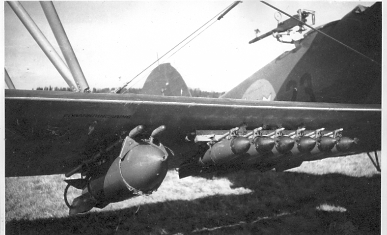 B 4A Hawker hart här laddad med sin tyngsta uppsättning bomber, 224 kg, 2 x 50kg + 12 x 12kg.